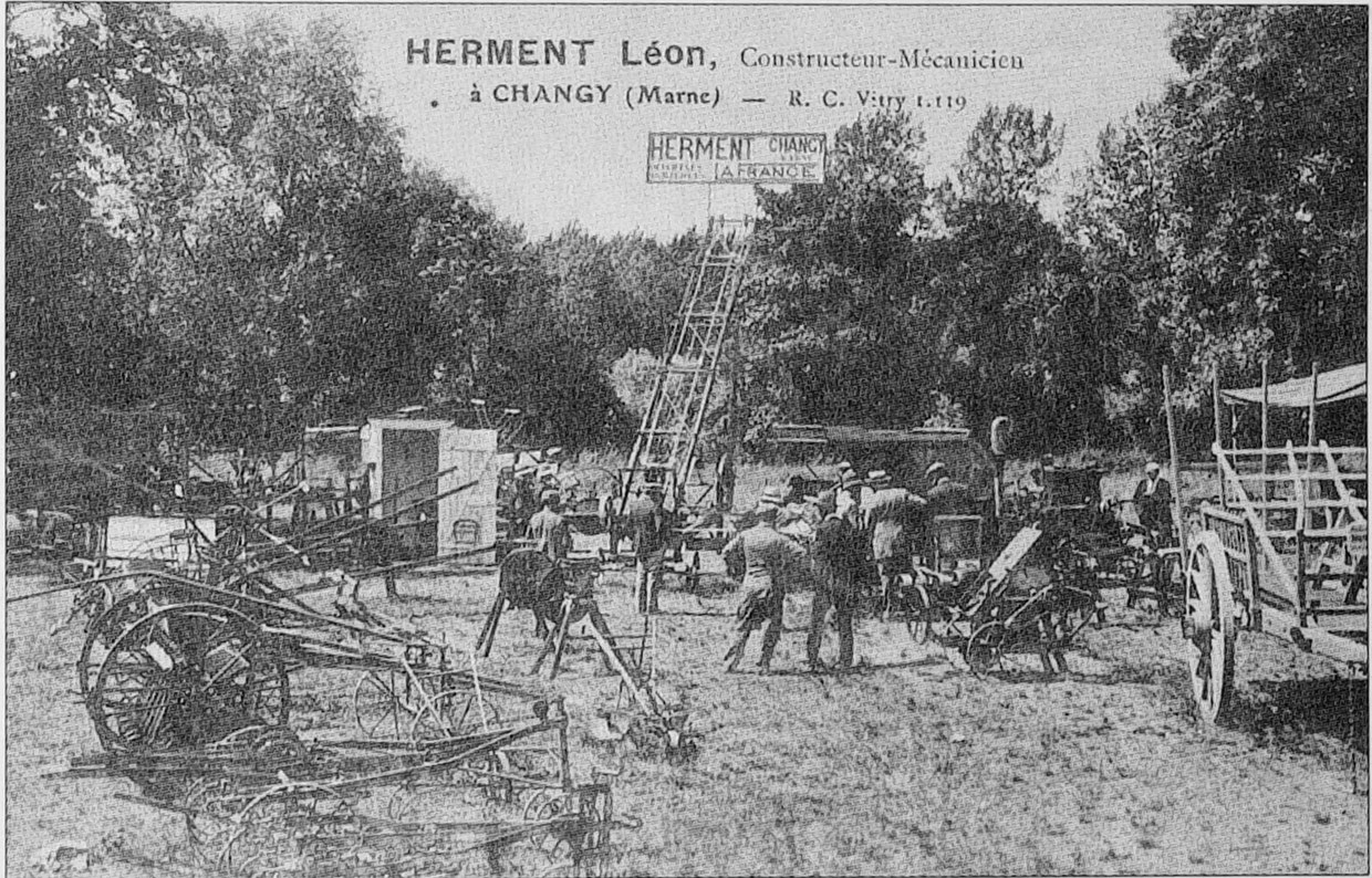 sur une vue ancienne.